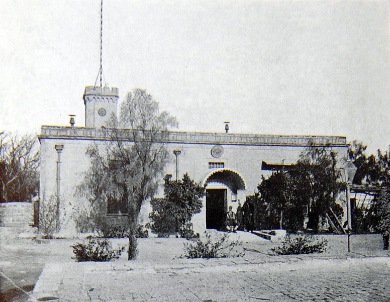 Здание Русского Императорского Генерального Консульства в Иерусалиме. Фото монаха Тимона. 1907 г.